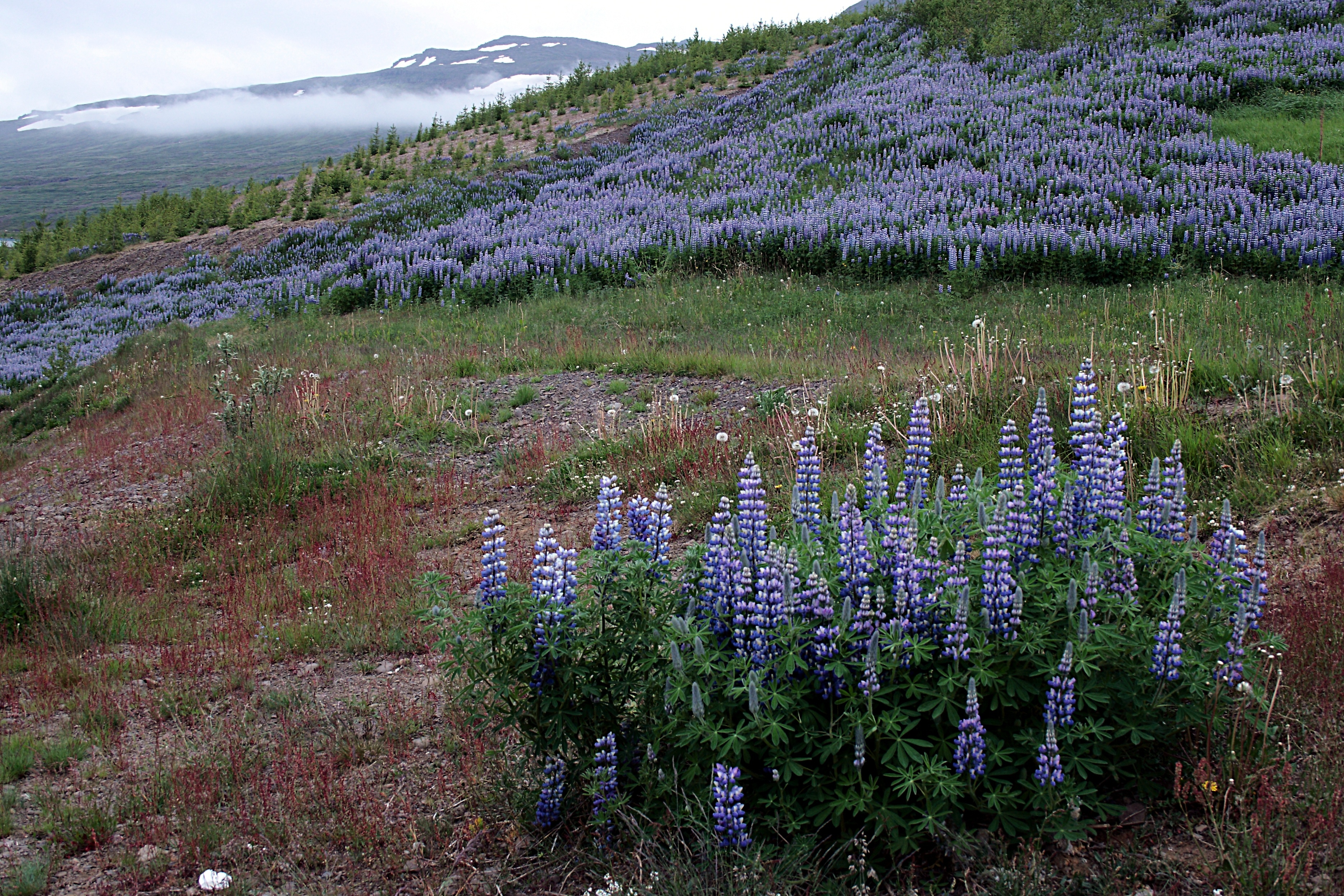 Reyðarfjörður